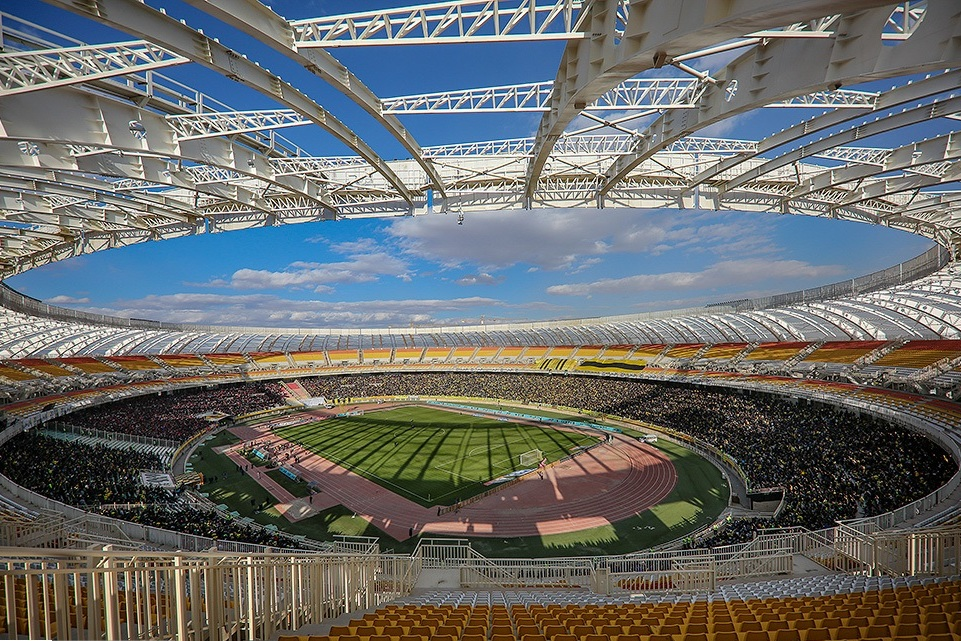 ورزشگاه نقش جهان، مسابقه میان سپاهان و پرسپولیس